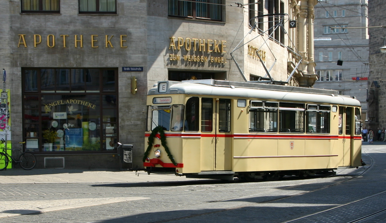 Demonstration der Rechten und Gegendemonstration der Linken am 1. Mai 2011 in [Halle (Saale).